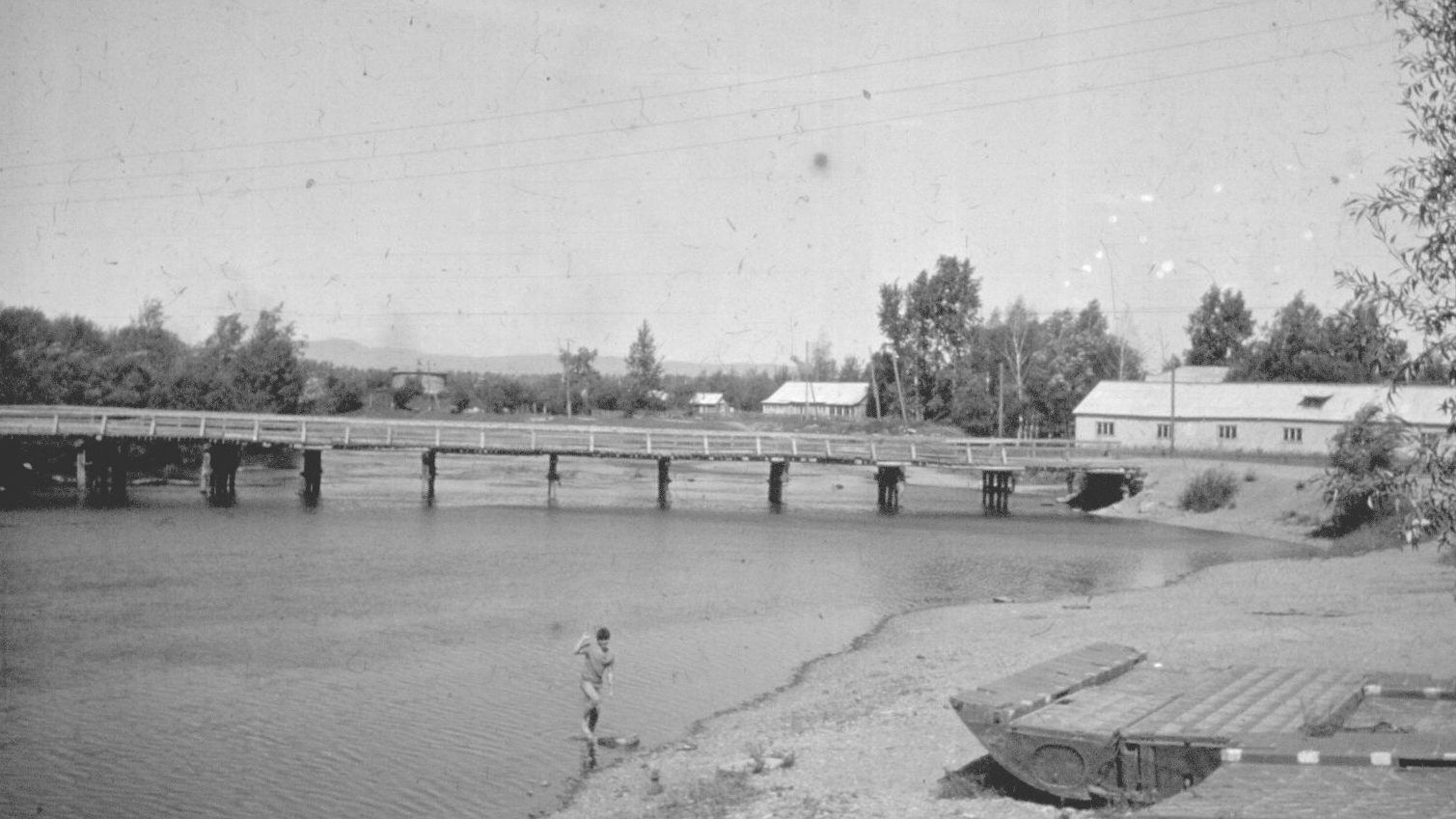 Река Кия у села Могилёвка района им. Лазо, Хабаровский край. Фото 1982 года.